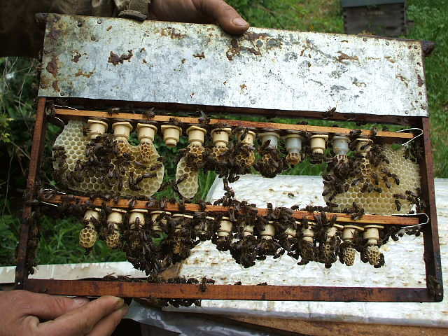 cellules royale.